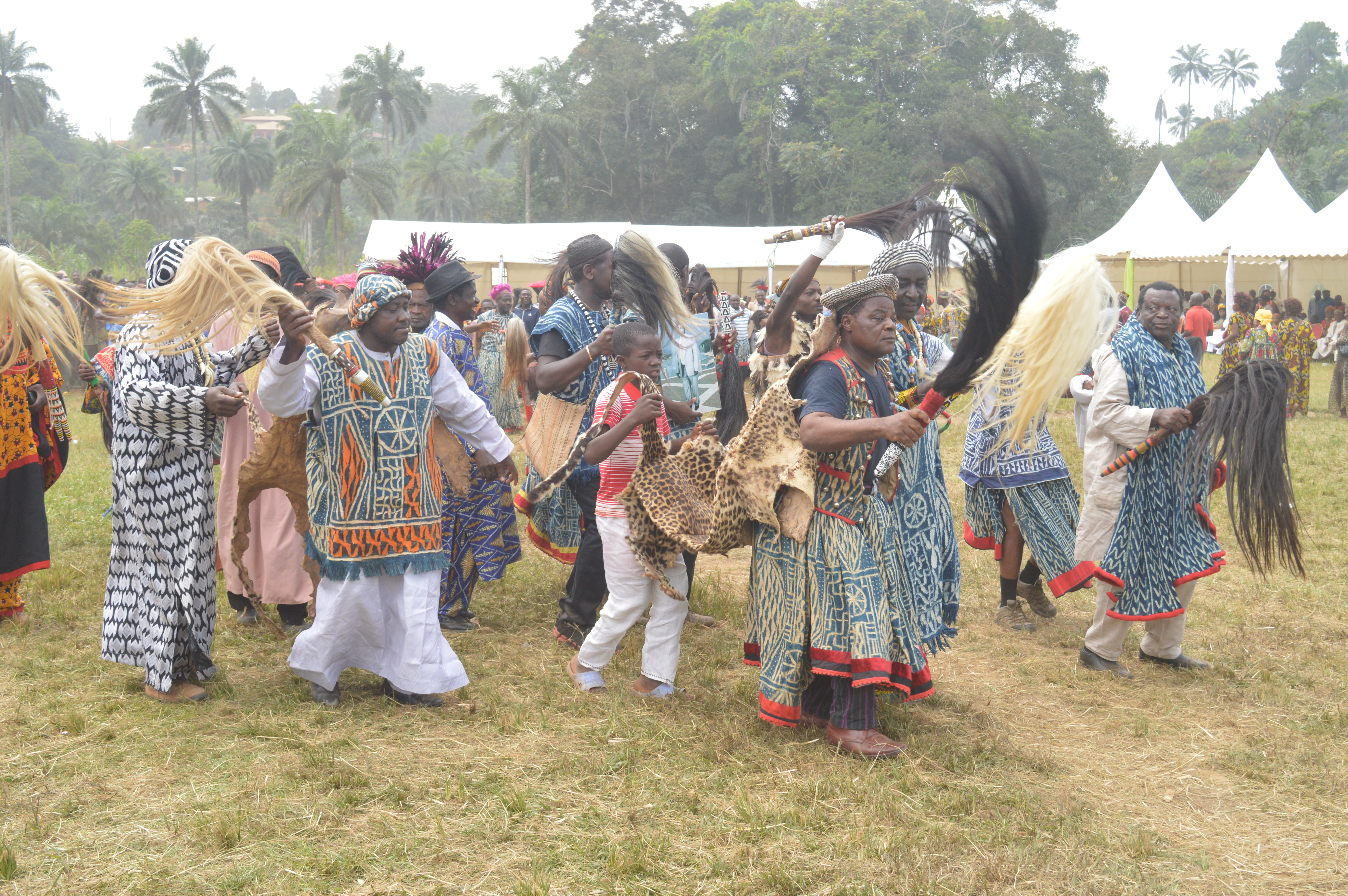 Pendant les funérailles en pays bamiléké This is an image from Cameroon